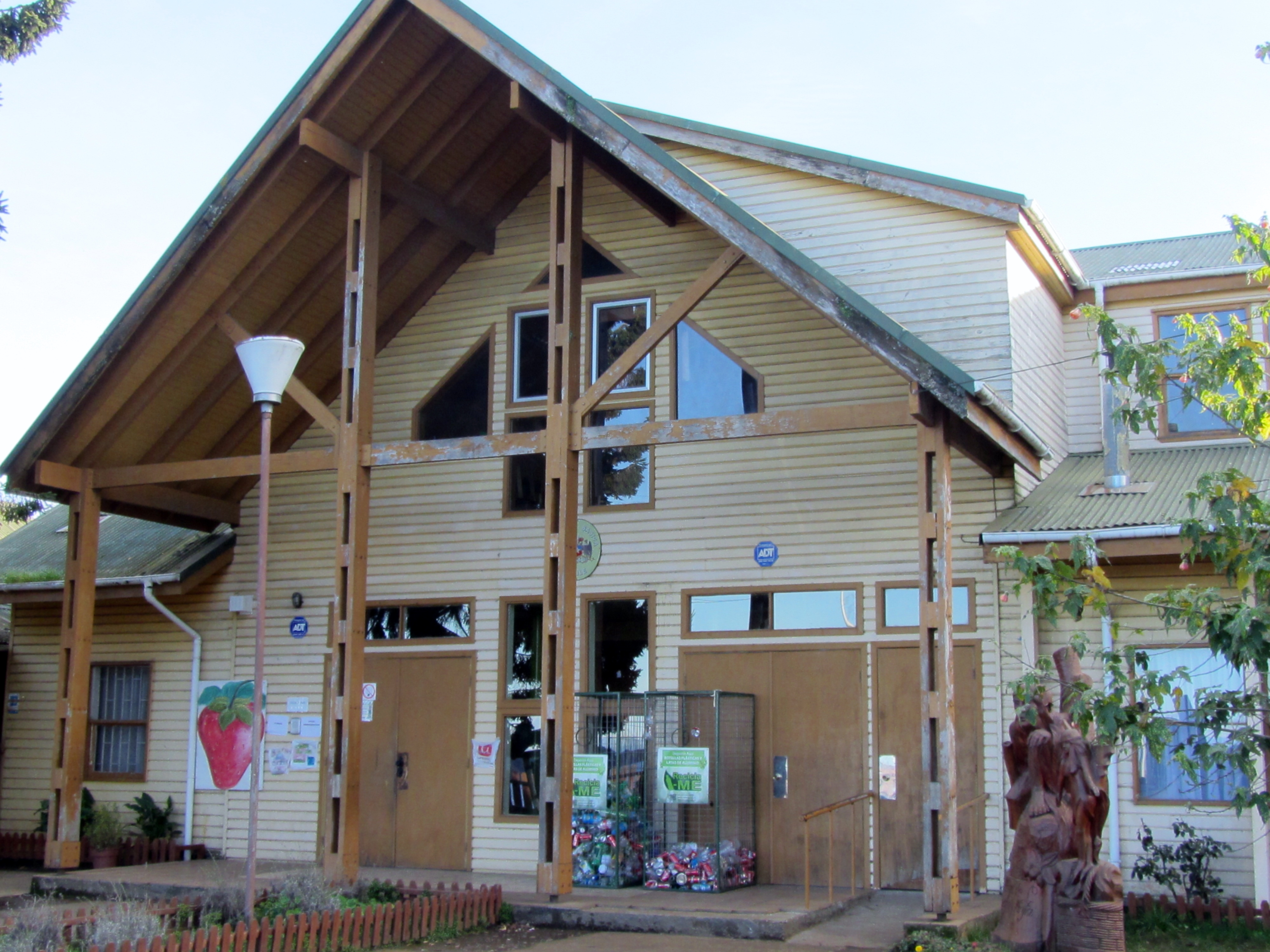 La Escuela Bernardo Philippi en la avenida homónima de Frutillar, Chile. A la derecha, una escultura de Francisco Toro Silva